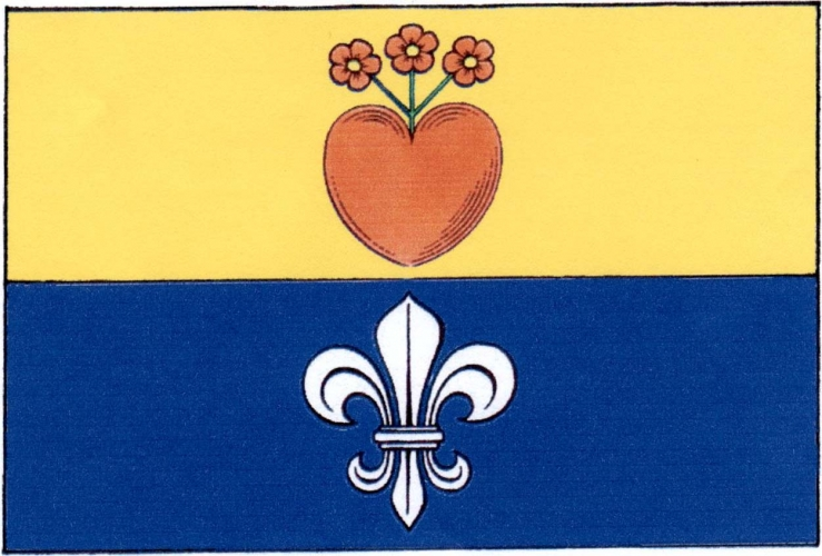 vlajka, Petráveč, okres Žďár nad Sázavou